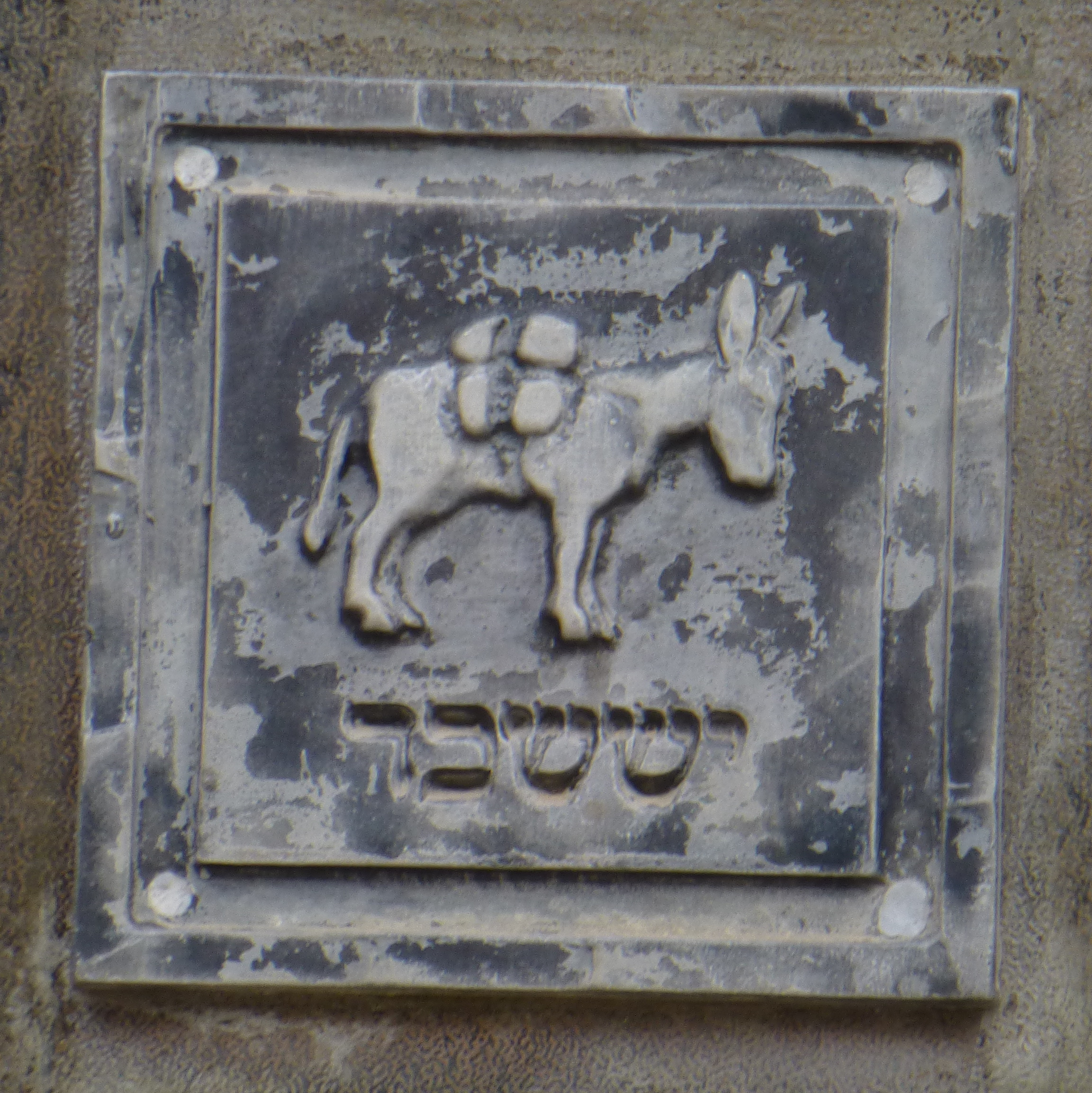 בית הכנסת הגדול "אוהל שרה" - בית הכנסת הראשון של רחובות, נבנה בשנת תרס"ד? ובהמשך שופץ והורחב והיה למוקד הקהילתי והחברתי של המושבה הצעירה.